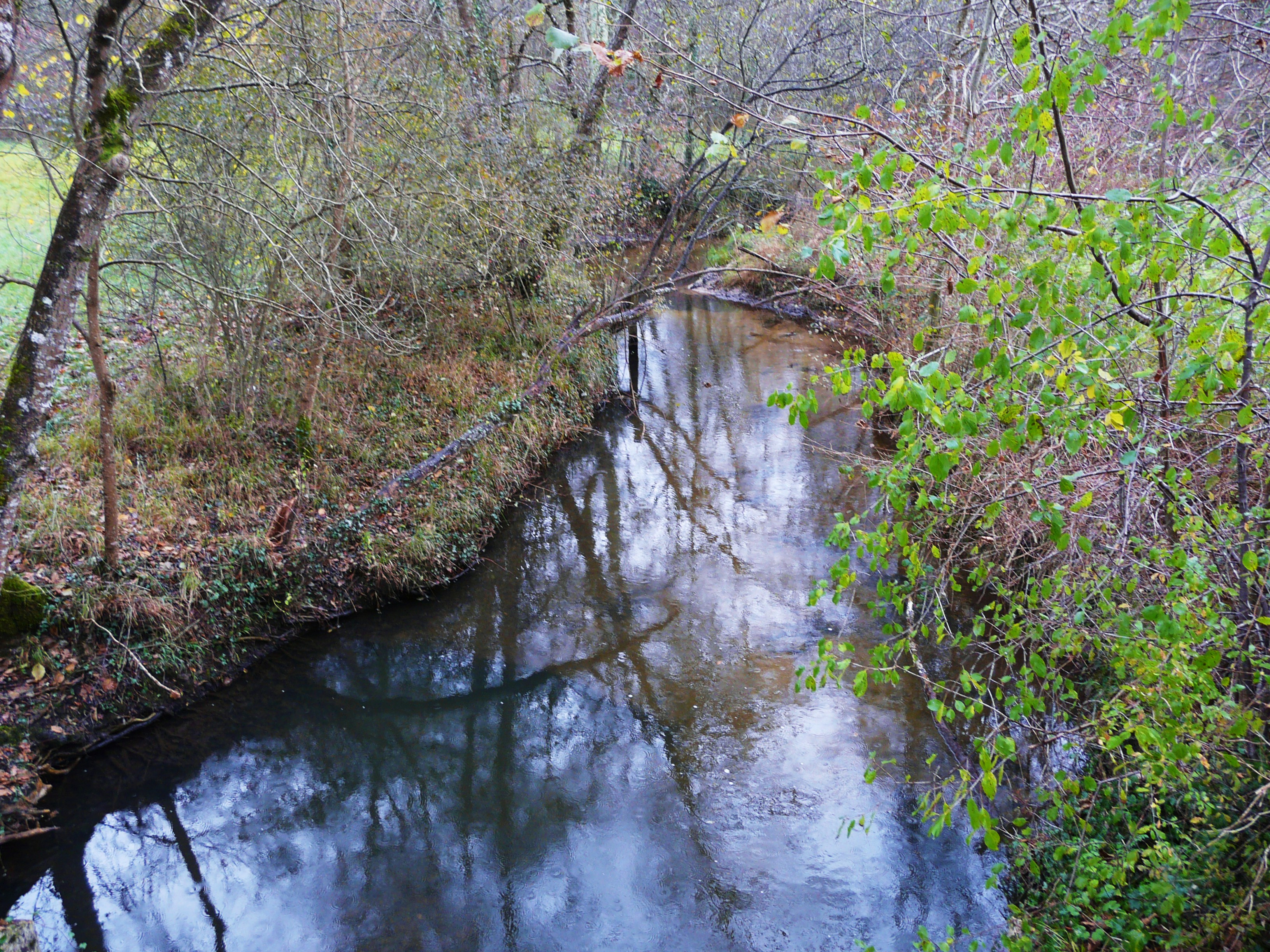 La Beauronne (vue vers l'amont) entre les Ralauds et le Moulin de Beauronne, Douzillac, Dordogne, France